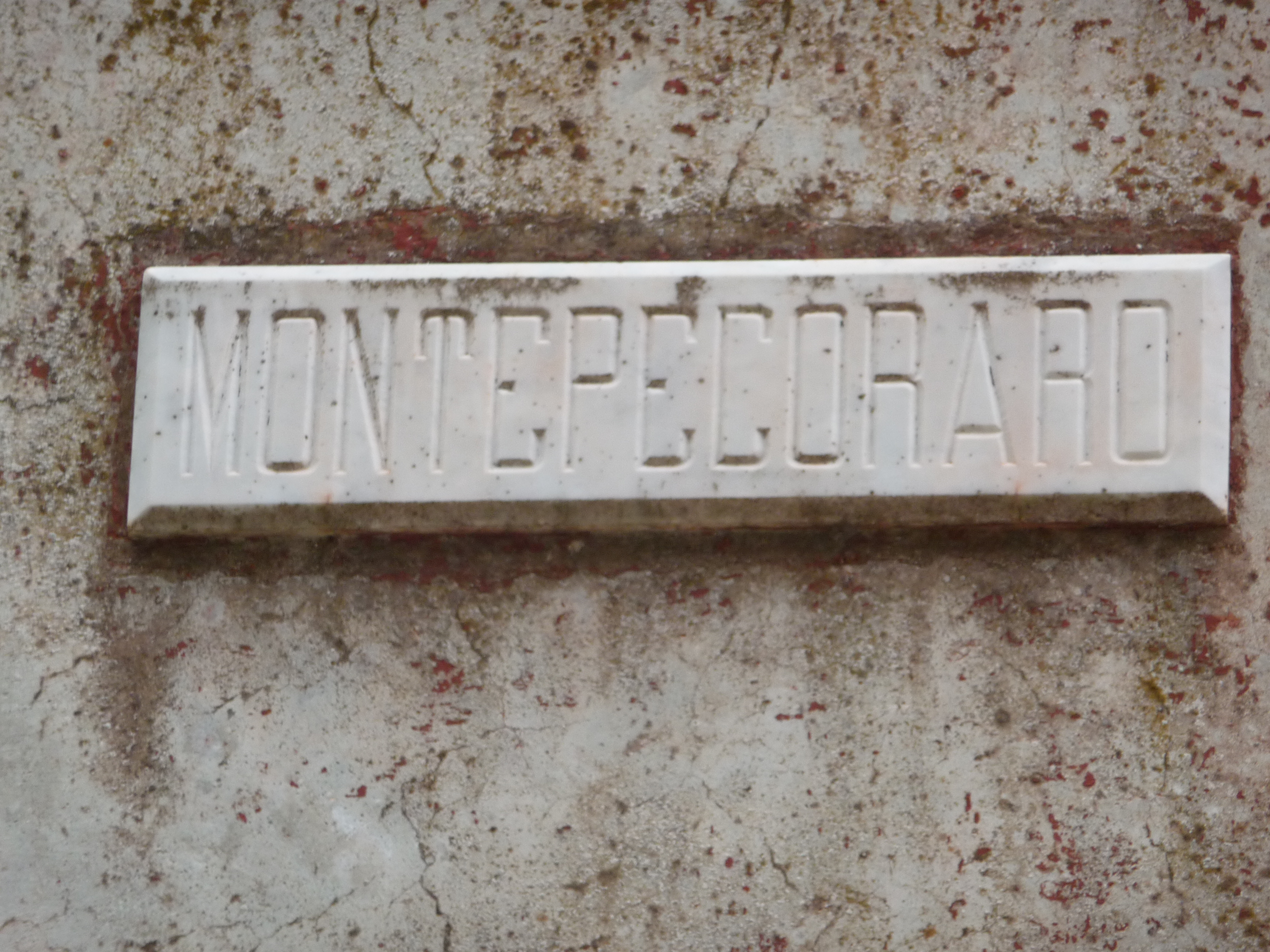 Insegna Monte Pecoraro